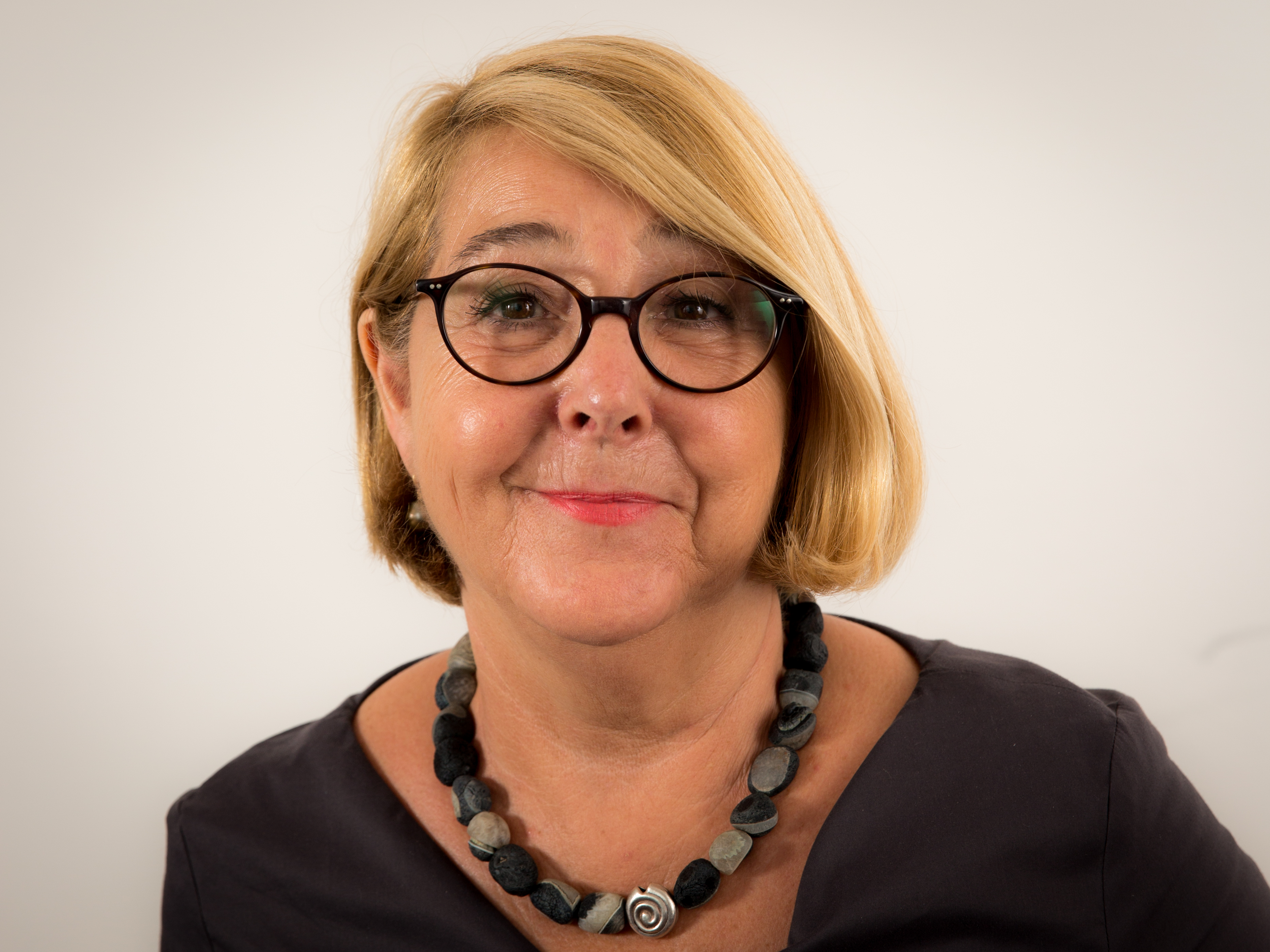 Die saarländische Landtagsabgeordnete Isolde Ries